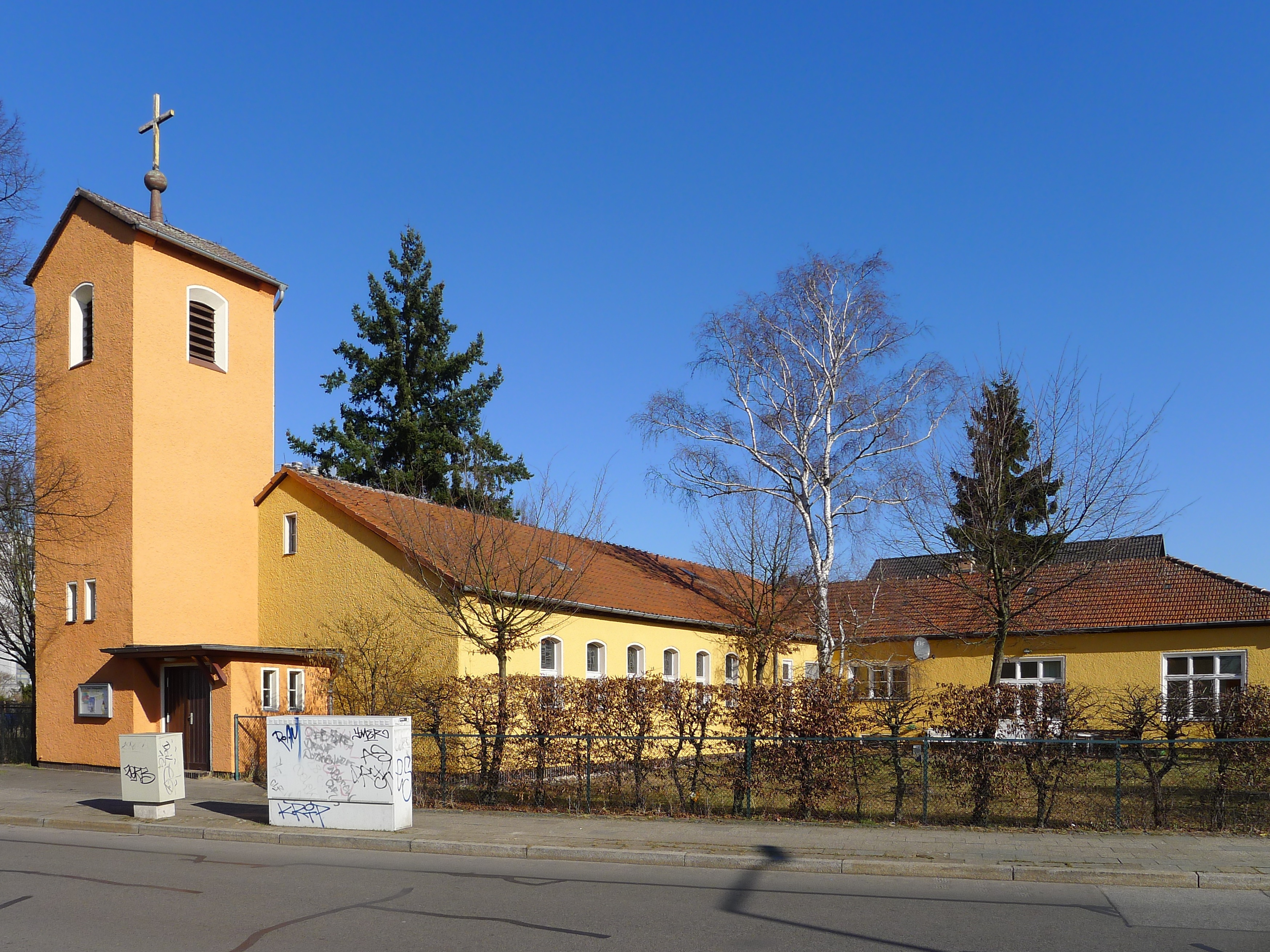 Blick auf den Gebäudekomplex vom Eichhorster Weg